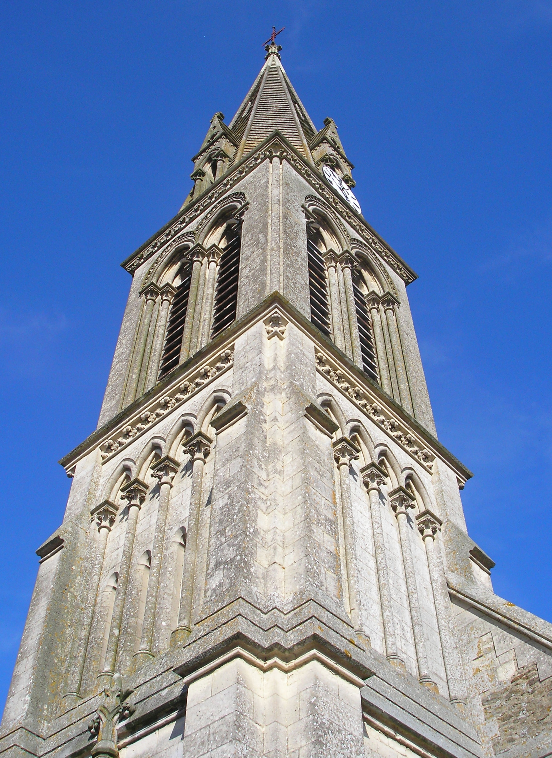 Banneville-sur-Ajon (Normandie, France). Le clocher de l'église Saint-Melaine.